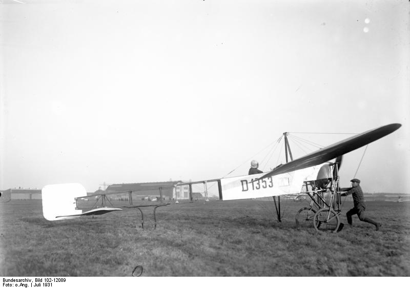 Der Veteran der Luftfahrt! Die alte Original-Bleriotmaschine, mit welcher der Pilot Bleriot 1909 als Erster den Ärmelkanal überflog, eine hervorragende Leistung, welche in der damaligen Zeit so viel Aufsehen erregte, wie heute die Ueberquerung des Ozeans.